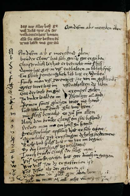 Cod. Eins. 277, Gedicht über Niklaus von Flüe, F. 221v